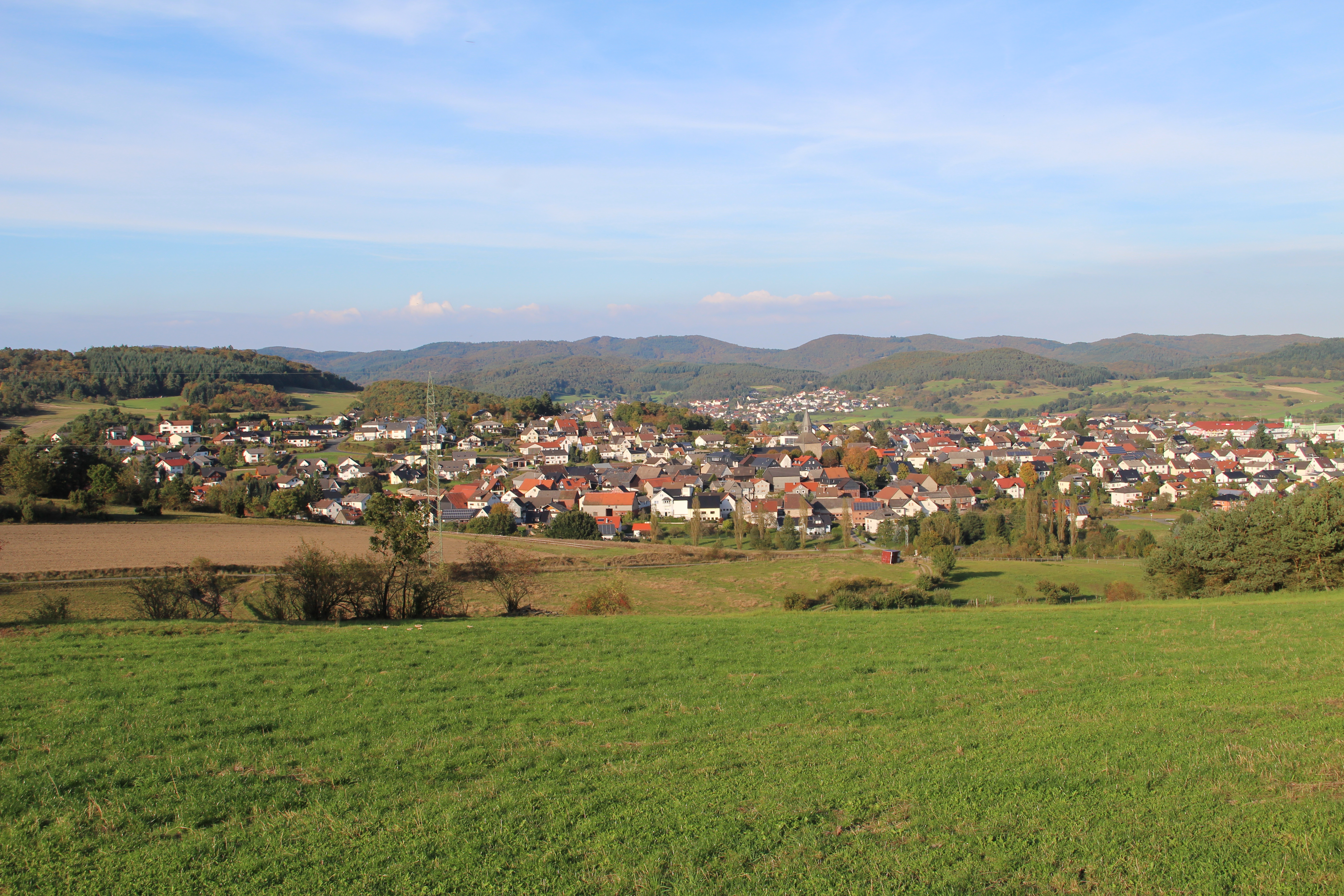 Panorama